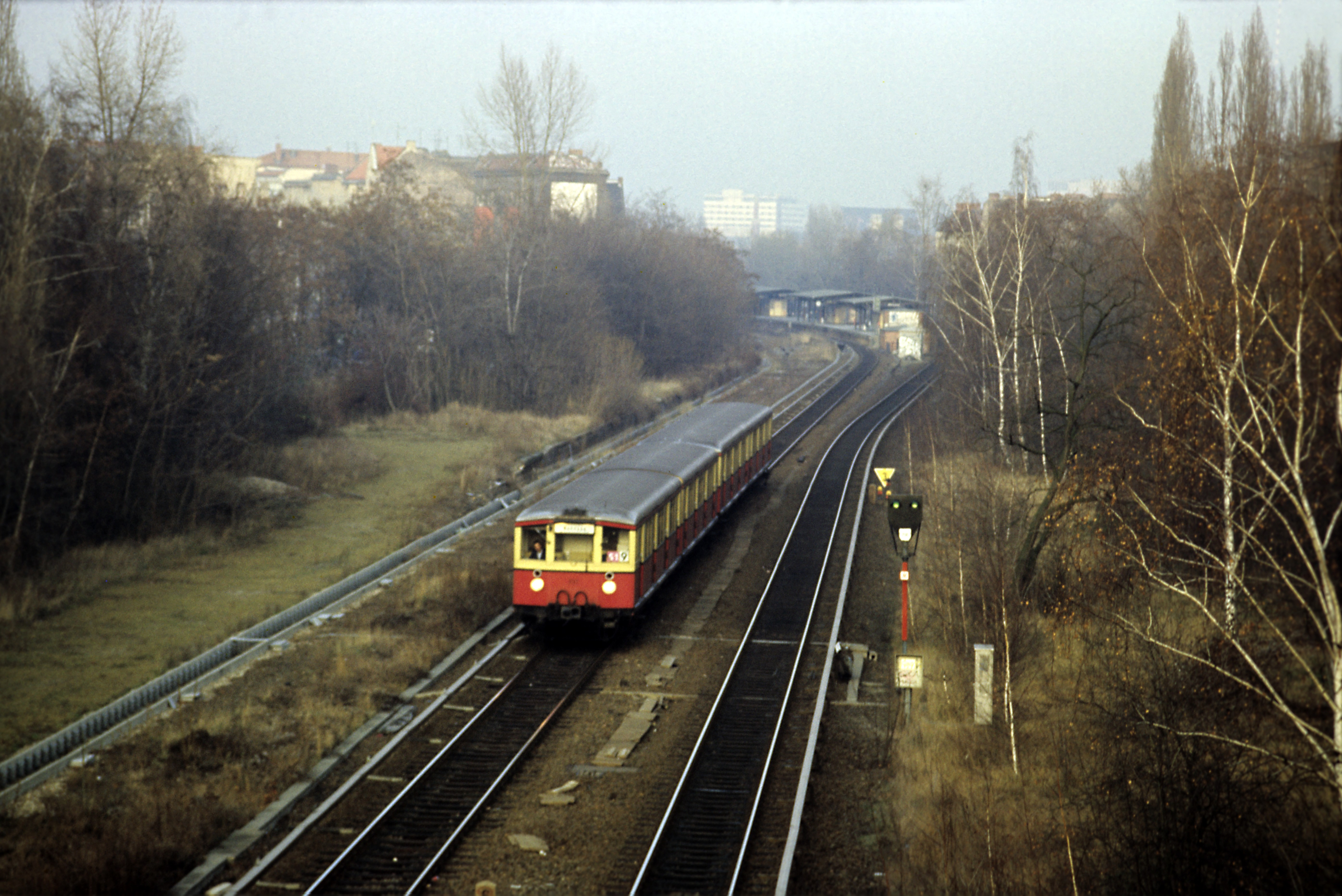 BVG-Zug der BR 275 Richtung Wannsee. Typisch für Wiederaufbauten durch die BVG ist das Verlegen von Kabelkanälen auf dem ungenutzten Fernbahnplanum. Man ging davon aus, dass die Strecken nie wieder benötigt würden. Auffällig ist das mehrteilig unterbrochene Bahnsteigdach des nur als Provisorium gebauten Hp Großgörschenstraße. Von der Langenscheidtbrücke Richtung Nordost.